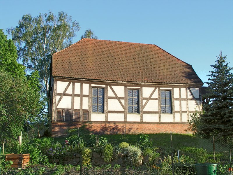 Kirche von Userin in Mecklenburg - Church of Userin (Germany/Mecklenburg)